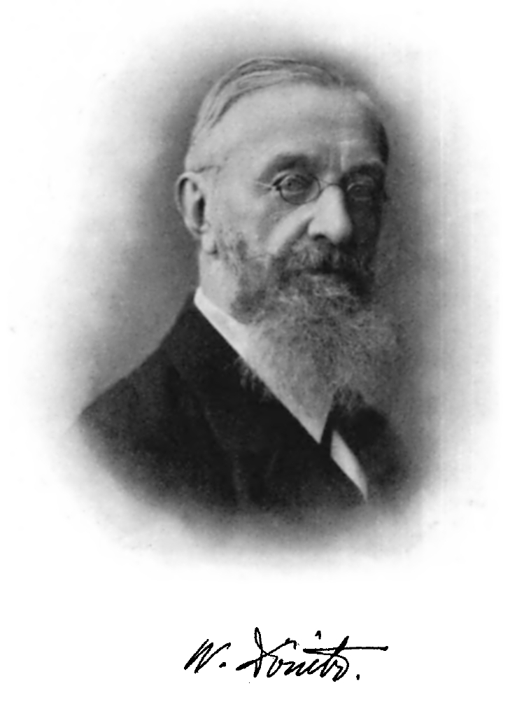 Friedrich Karl Wilhelm Dönitz (27 June 1838 – 12 March 1912)